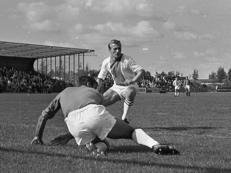 Volewijckers tegen Velox 2-0. Johan Engelsma (V) in duel met keeper van Ledden (Velox)